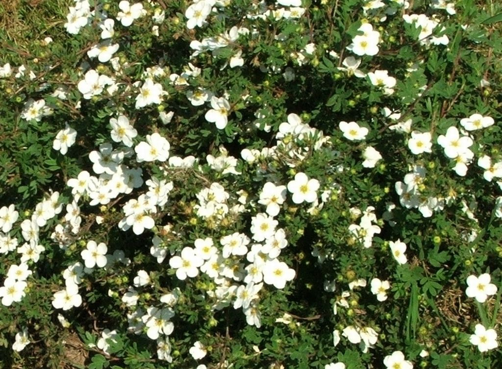 Potentilla fruticosa (pl. pięciornik krzewiasty)